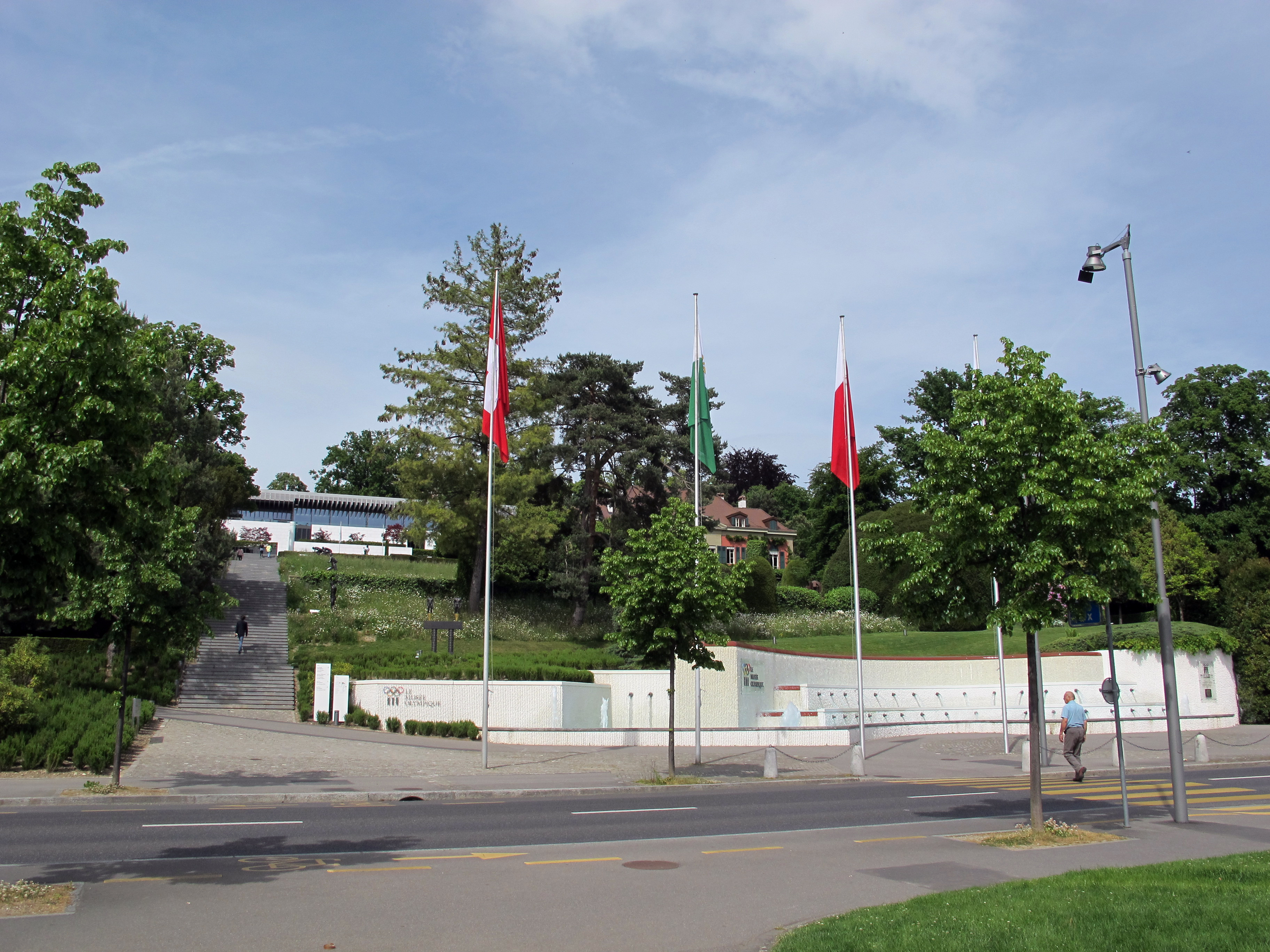 Musée Olympique, Losanna